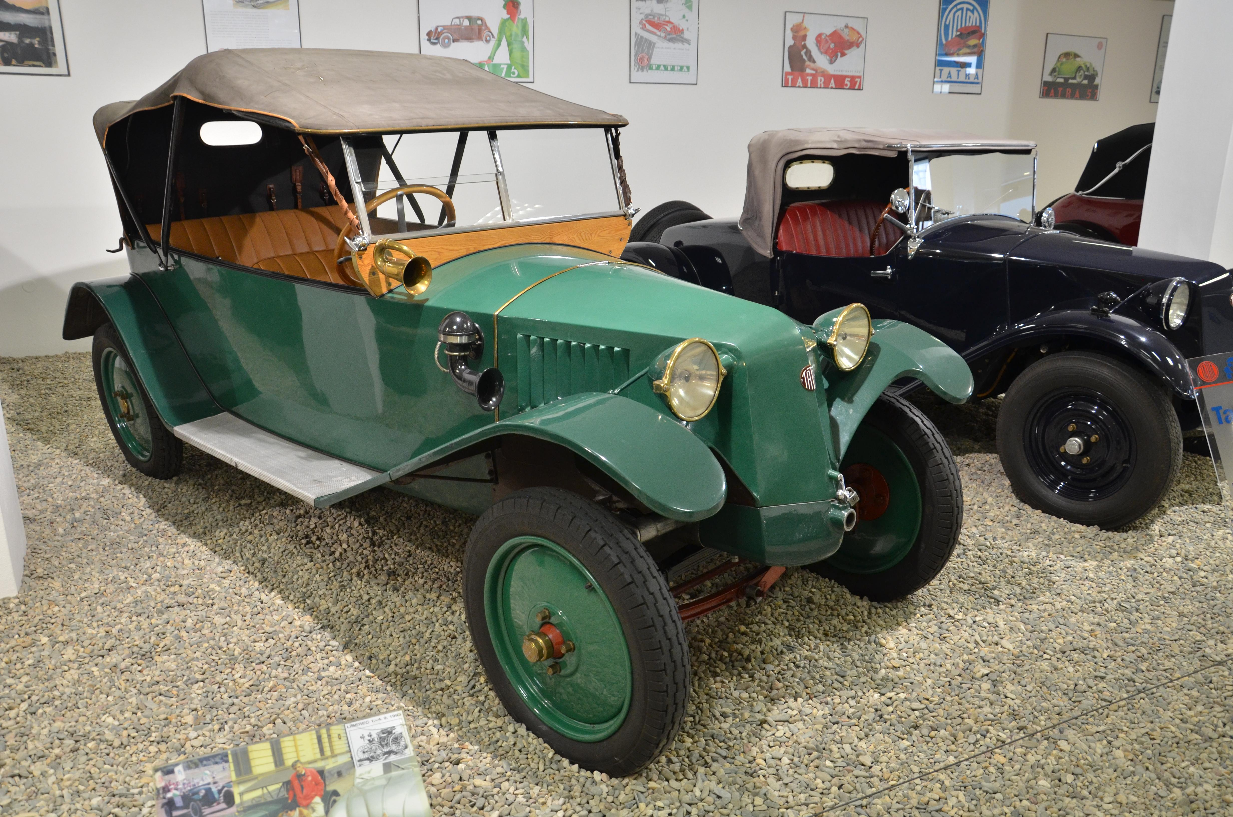 Tatra 11 v Tatra Muzeum Kopřivnice